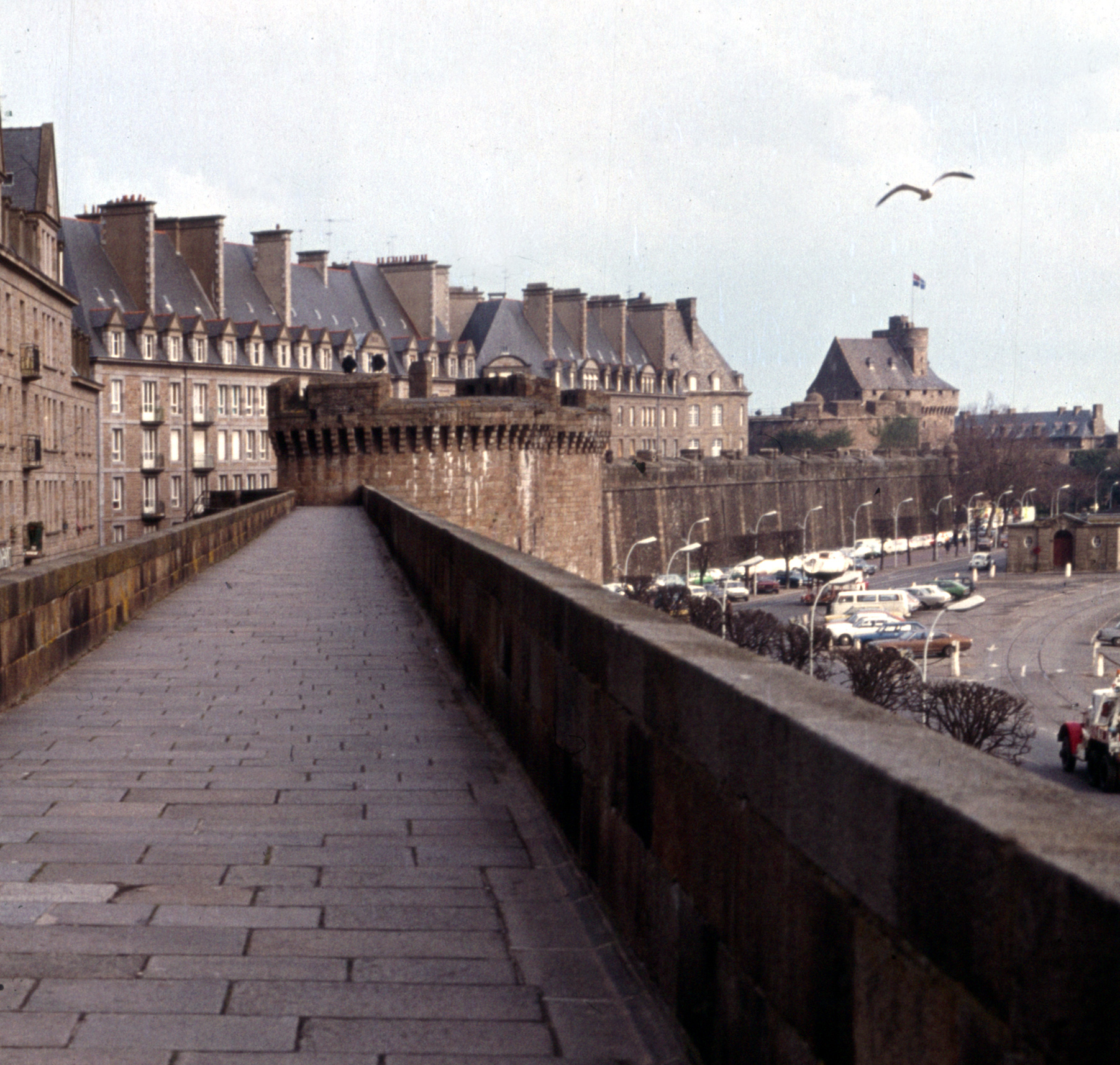 Saint-Malo 1978